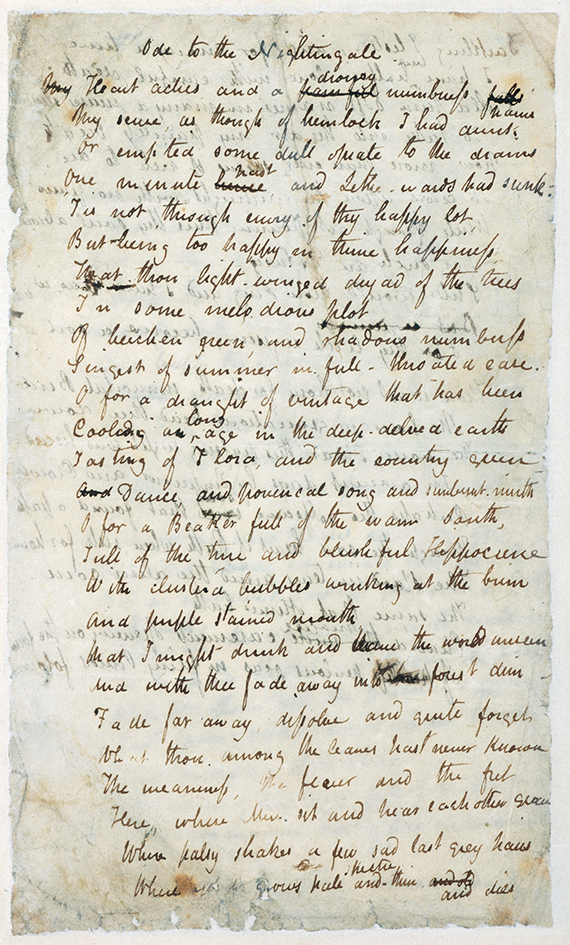 Autograph manuscript.